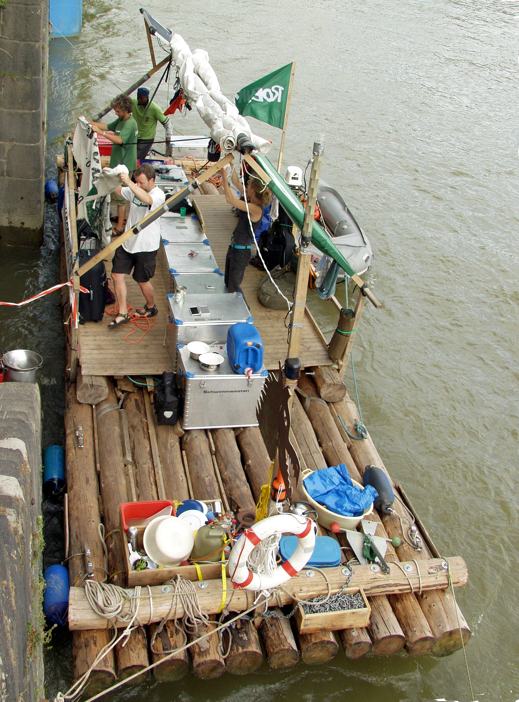 Floß von Robin Wood vor Anker auf dem Rhein in Köln während ihrer Kampagne „Stromwechsel jetzt! Floß geht's!“